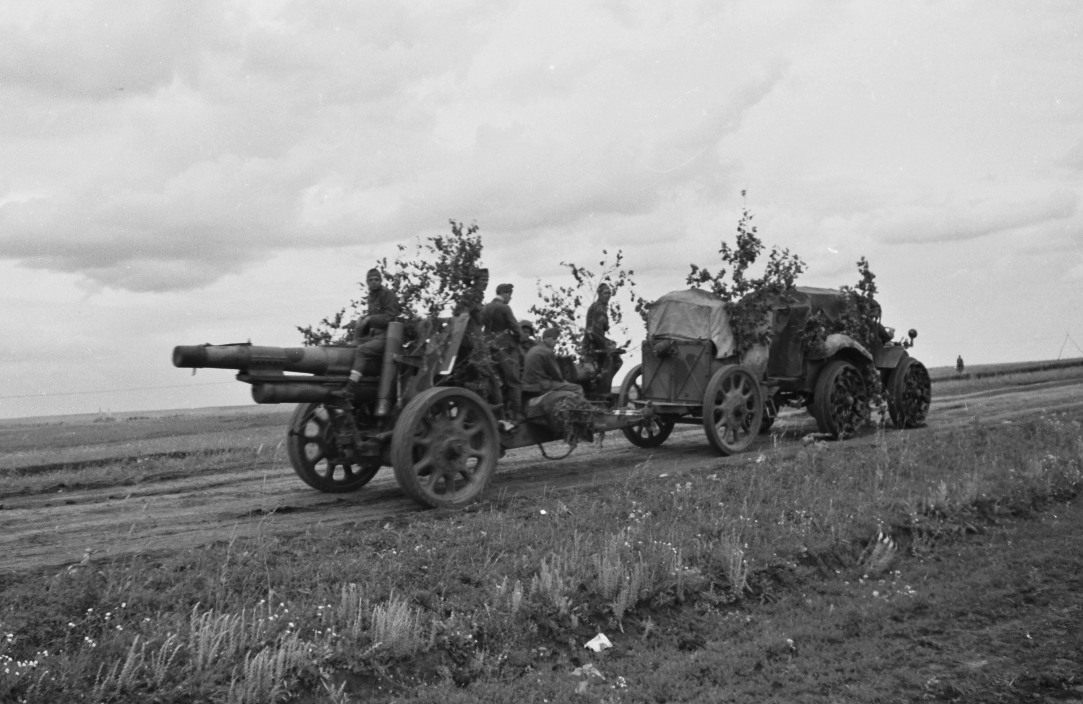 A magyar honvédség 28M Pavesi tüzérségi vontatója és egy 15 cm-es 31M közepes tarack. Tags: cannon, weapon, tow truck, ordnance Title: A magyar honvédség 28M Pavesi tüzérségi vontatója és egy 15 cm-es 31M közepes tarack.